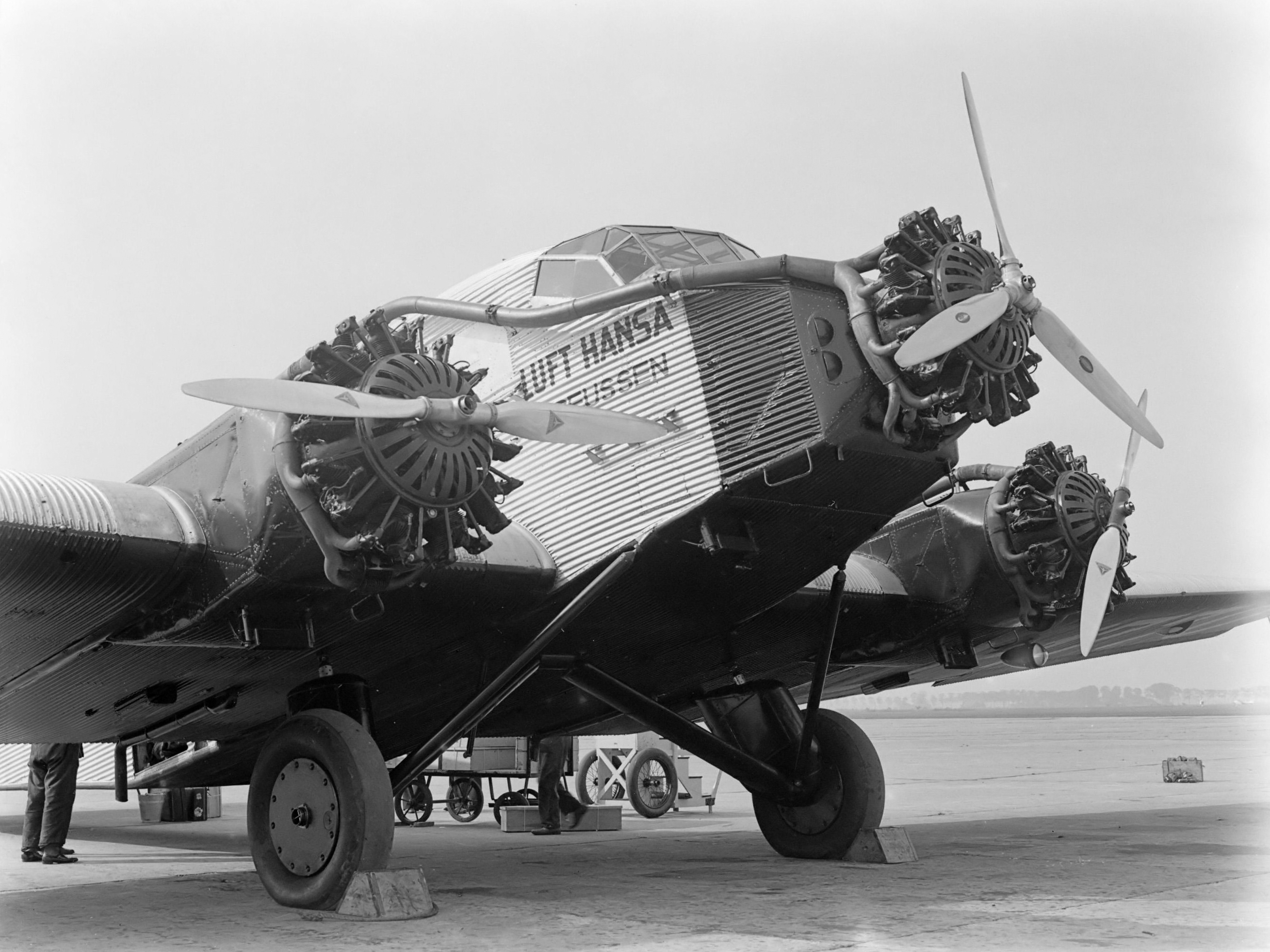 Een Junkers G 31, D-1770 'Preussen' van de Deutsche Luft Hansa AG. De Gnome & Rhône-motoren zijn duidelijk zichtbaar. Het toestel werd in november 1929 in gebruik genomen.